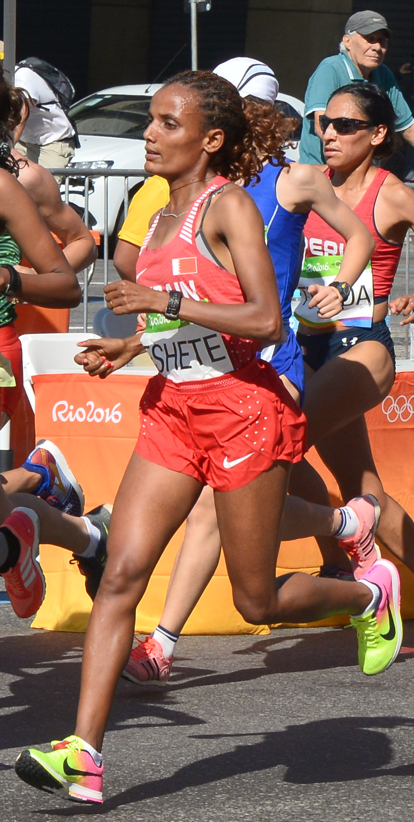 Passage du marathon des jeux olympiques de Rio 2016 dans le centre de Rio